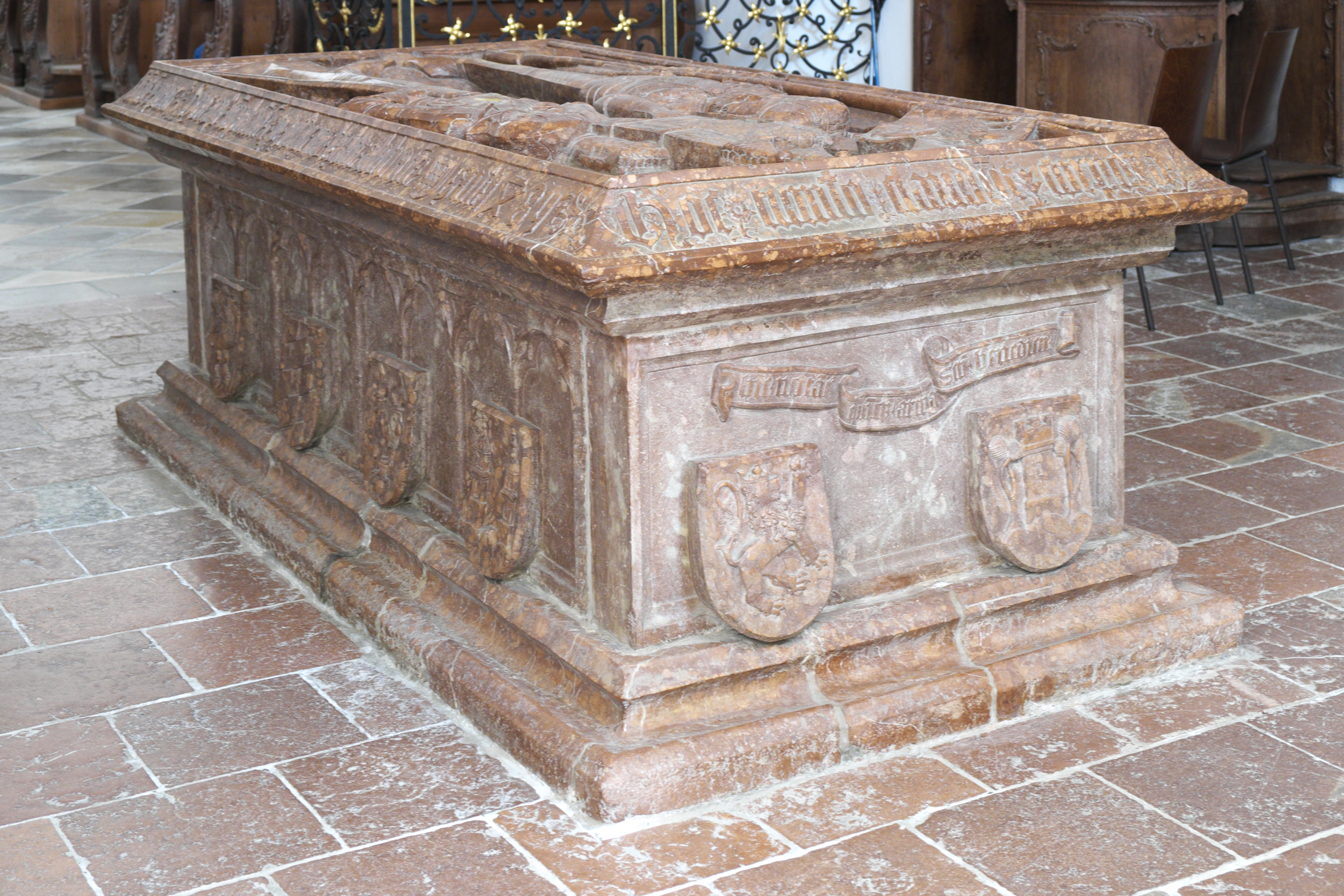 Katholische Pfarrkirche St. Marinus und Anianus, ehemalige Abteikirche des Benediktinerklosters Rott in Rott am Inn im Landkreis Rosenheim (Bayern/Deutschland), Tumba der Stifter Kuno I. von Rott und seines Sohnes Kuno II. von Rott